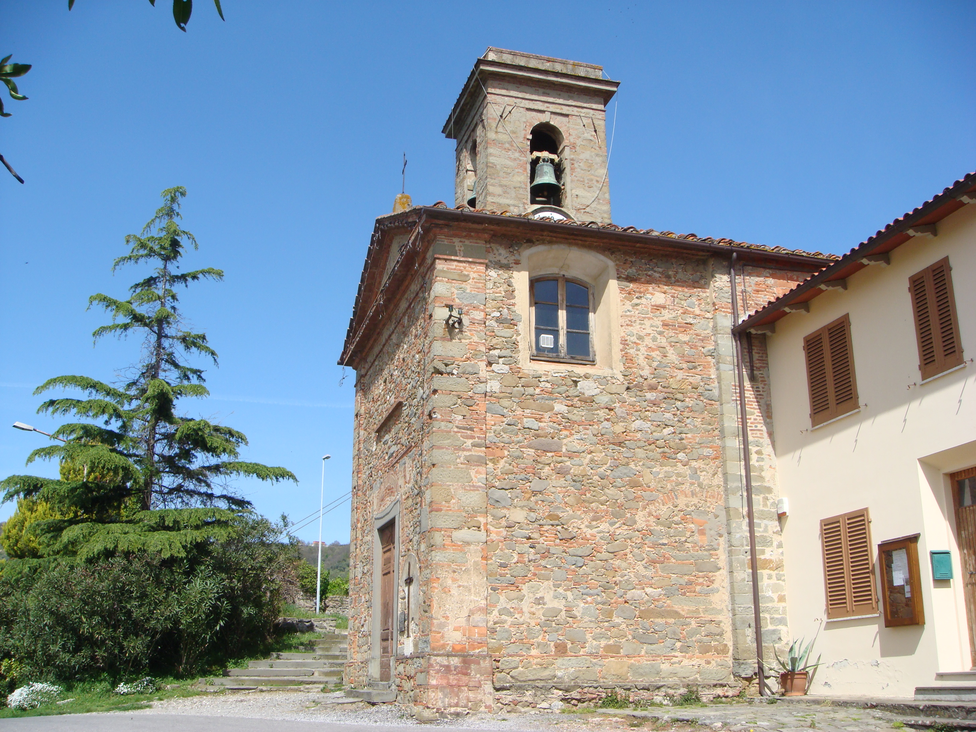 La chiesa di Cecina di Larciano (Provincia di Pistoia, Italia)